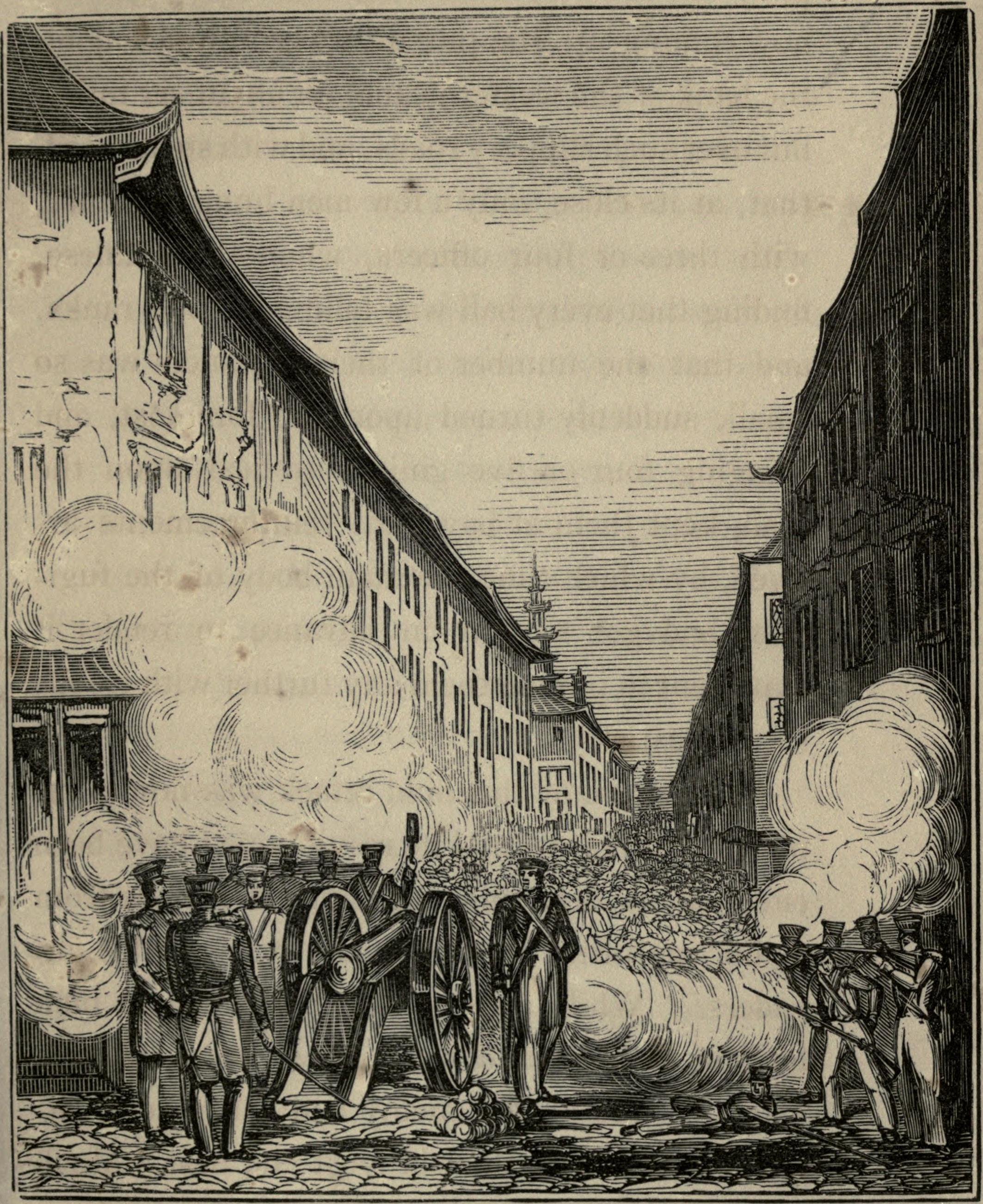 Repulse at Ningpo